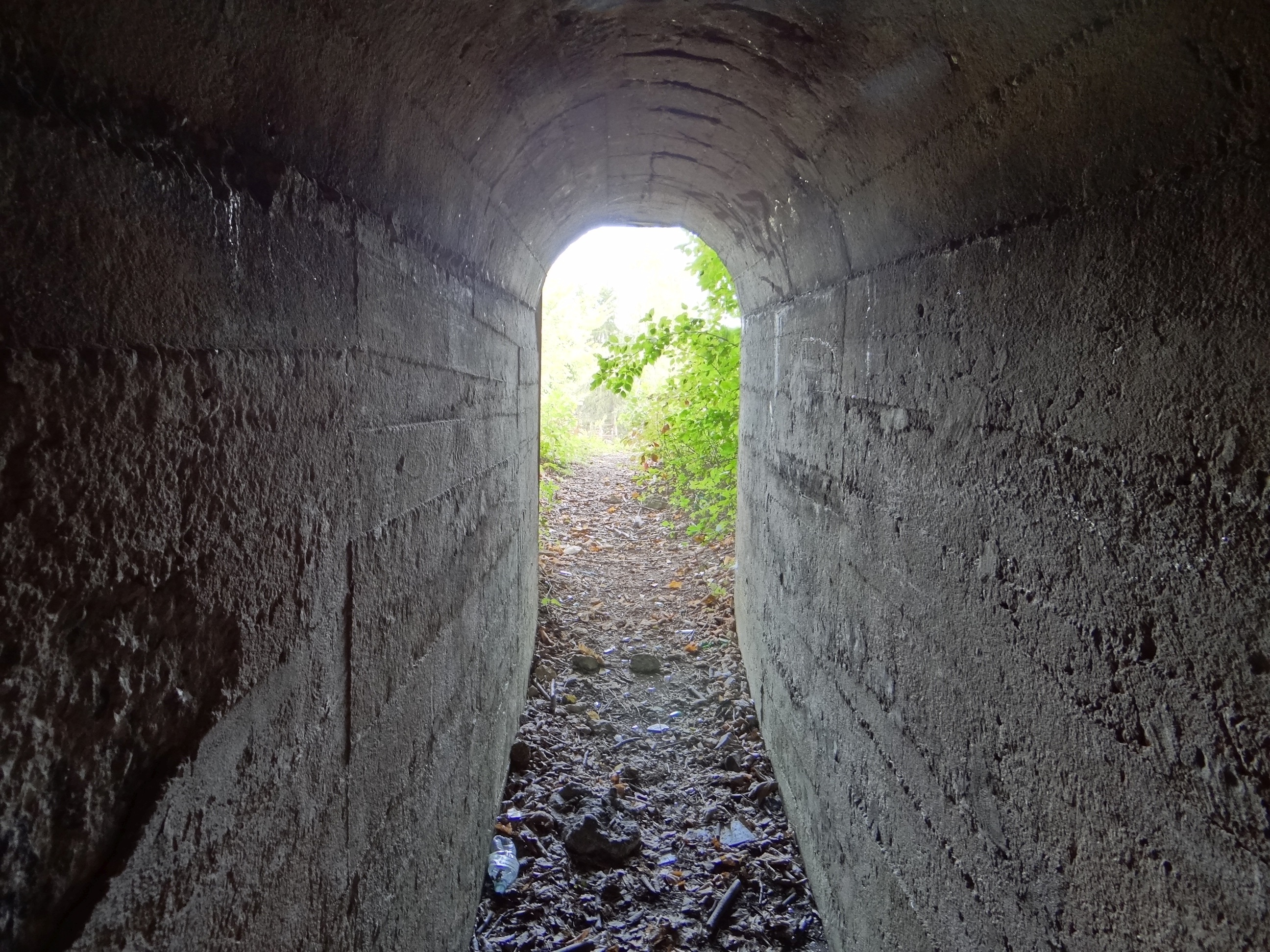 Kawerna w Wielkanocy na osiedlu Bodzów w Krakowie